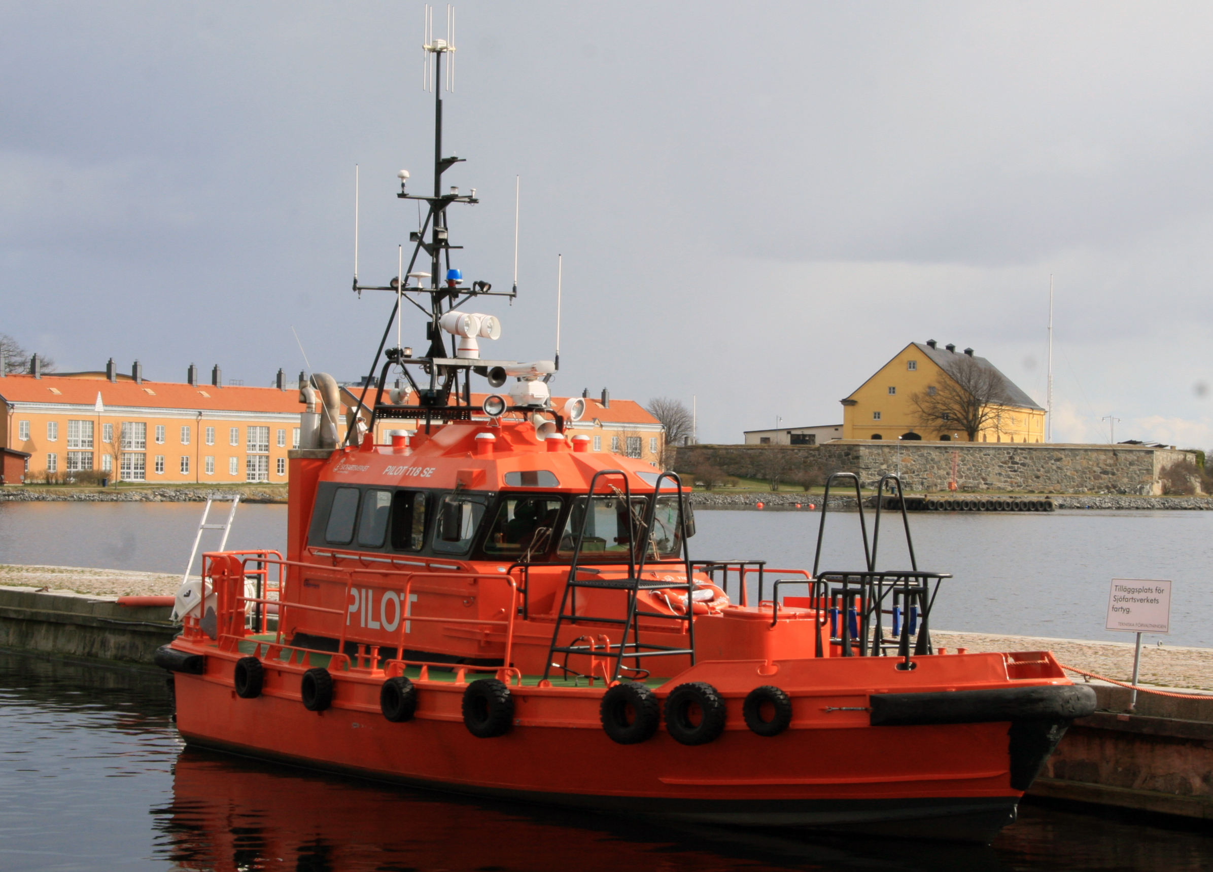 Pilot 118 SE i Karlskrona 20 mars 2008